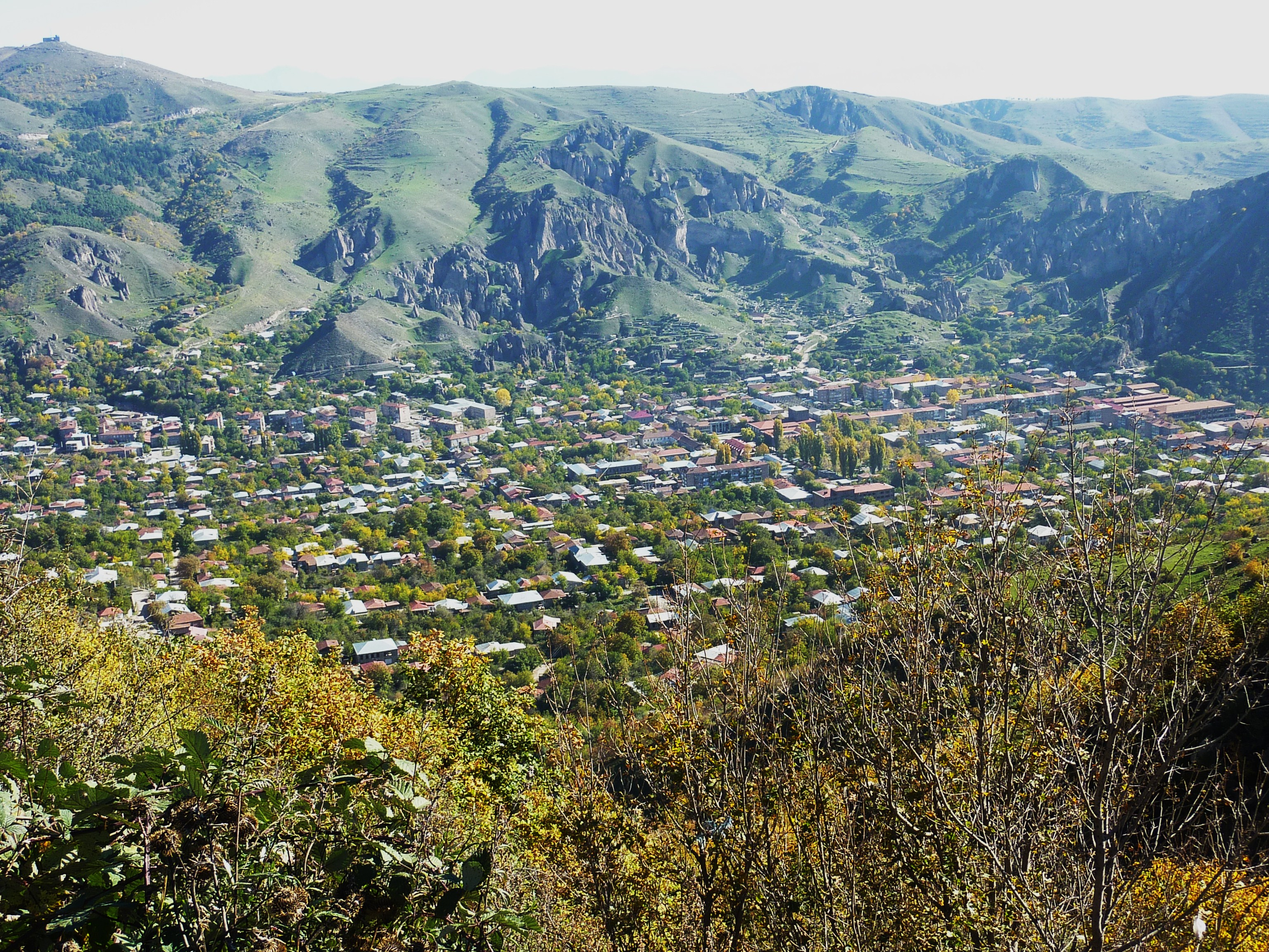 Vue générale de la ville de Goris